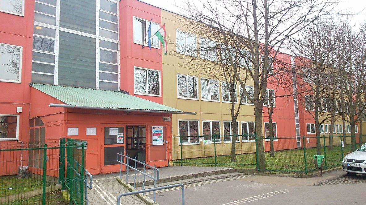 Bethlen Gábor Szakgimnázium épülete 2017-ben, Budapest